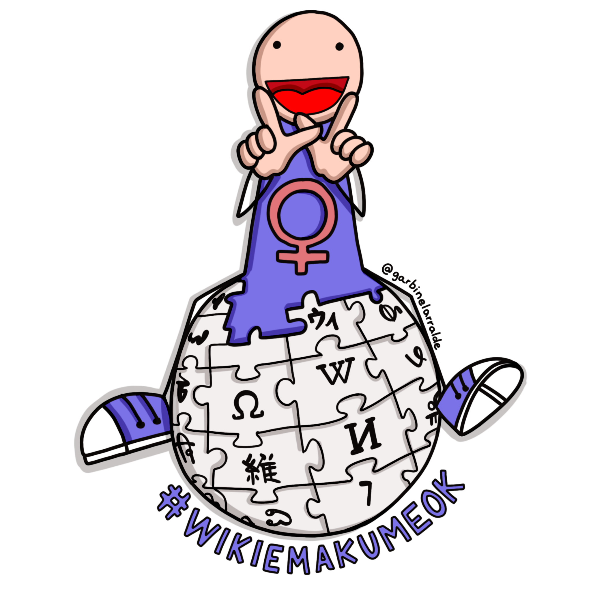 Imagen sin fondo